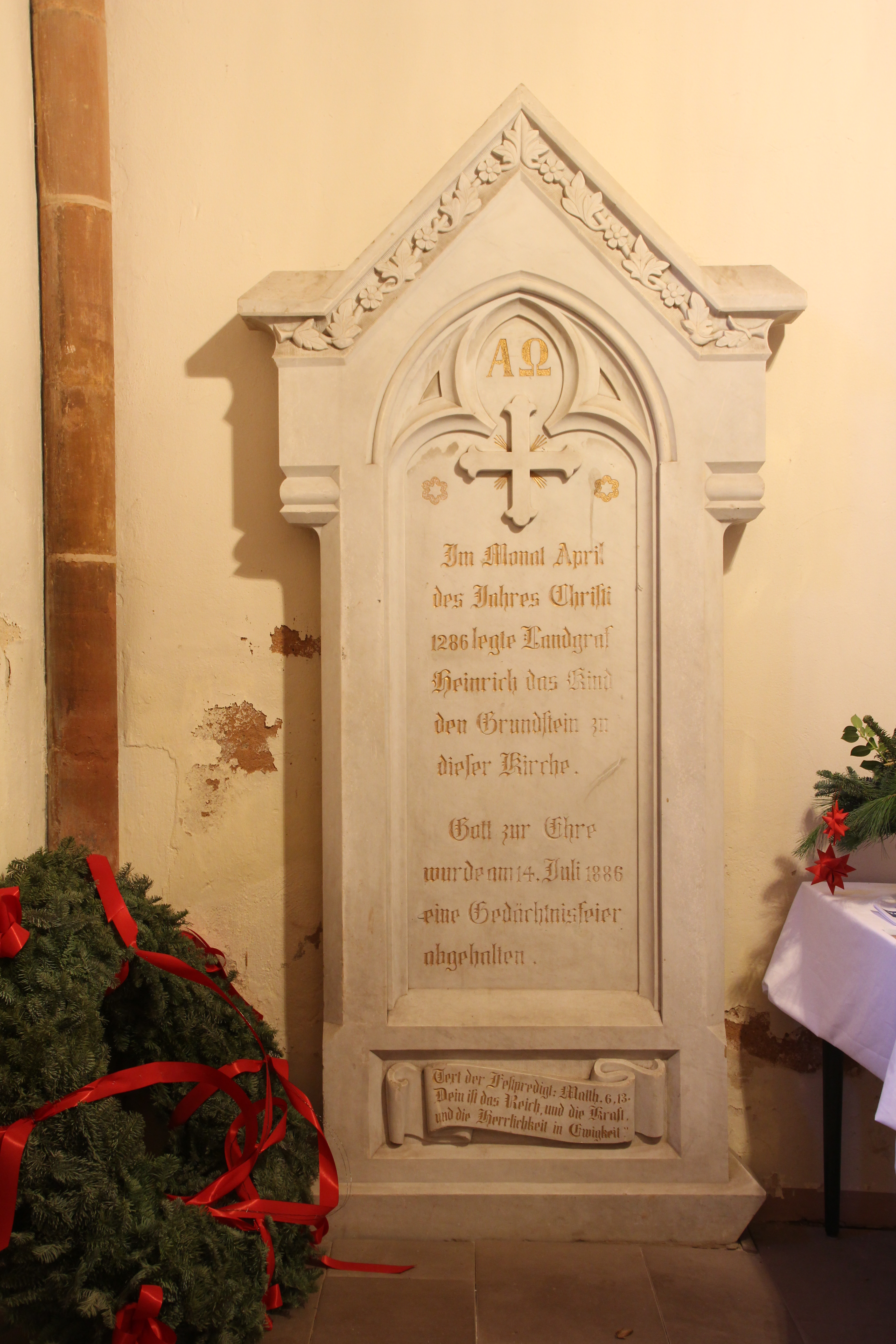 Siehe Bild und Dateiname. Mit „Landgraf Heinrich das Kind“ ist Heinrich I. (Hessen) gemeint.